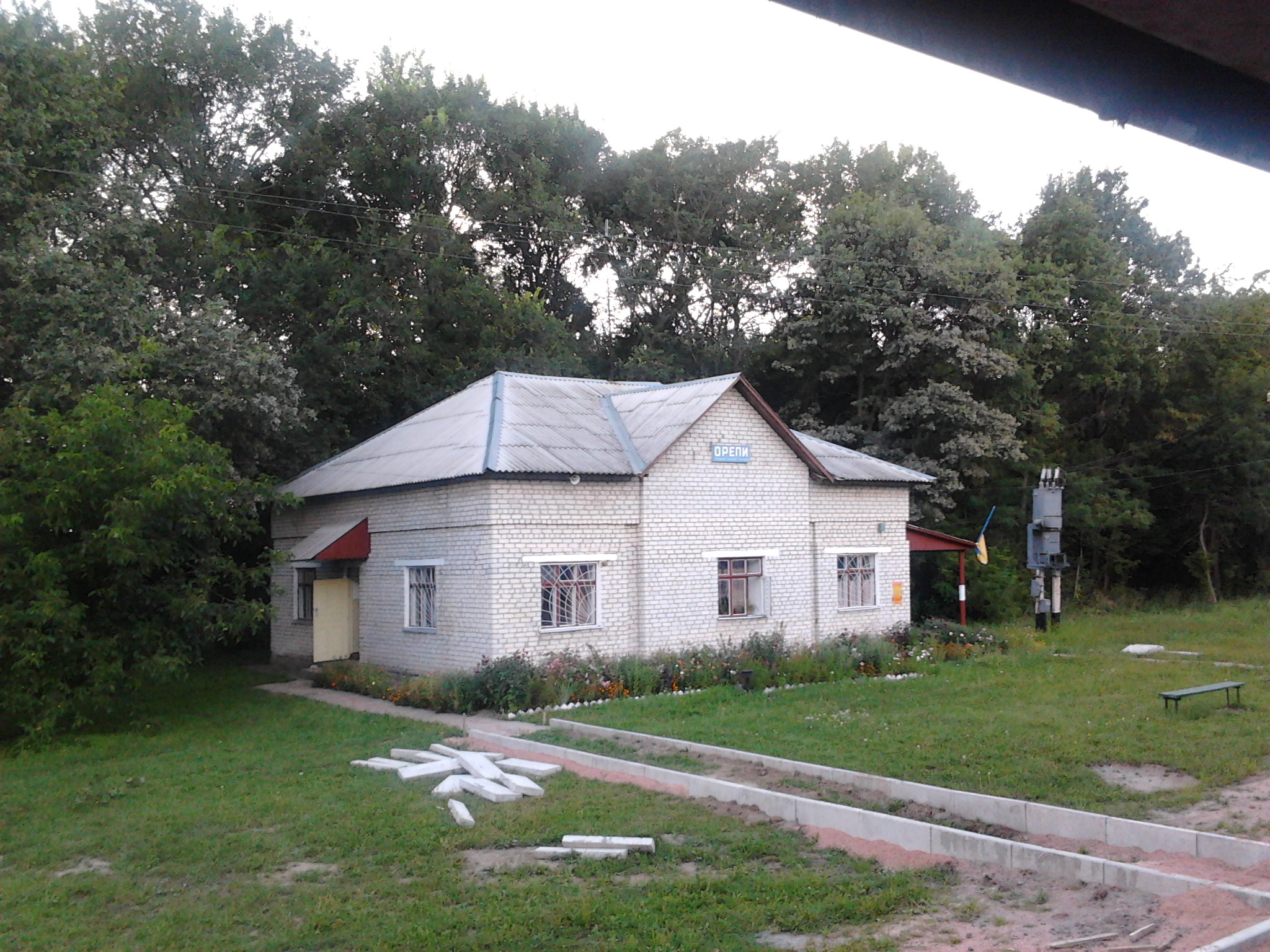 Пост ЕЦ станції Орепи